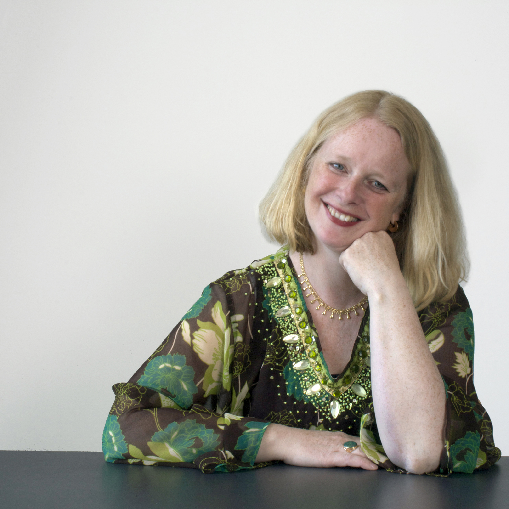 Janny van der Molen is een Nederlands auteur van Kinderboeken